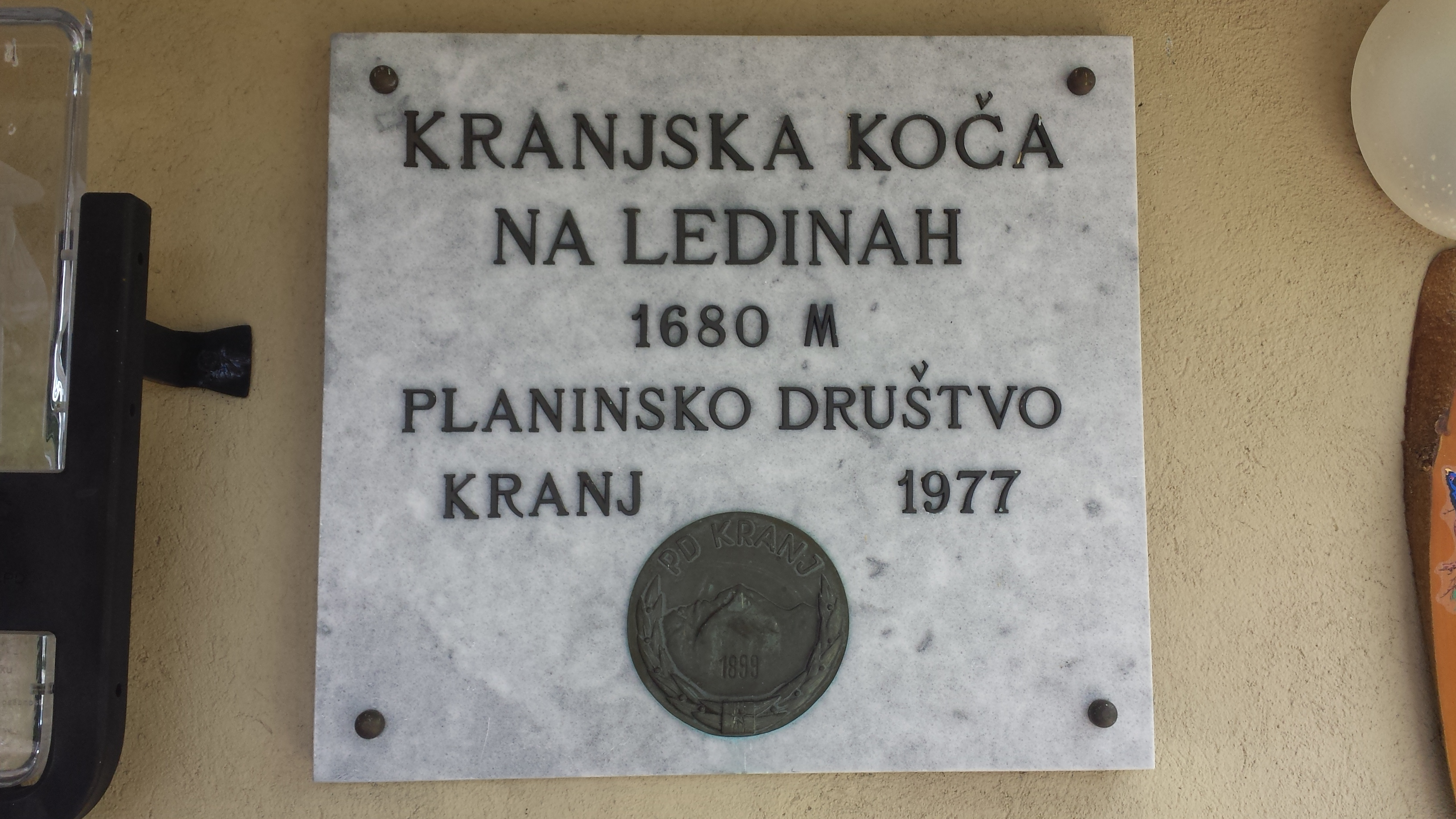 Kranjska koča na Ledinah 1869 m. n. m. Jezersko, Slovenija. Spominska tabla.